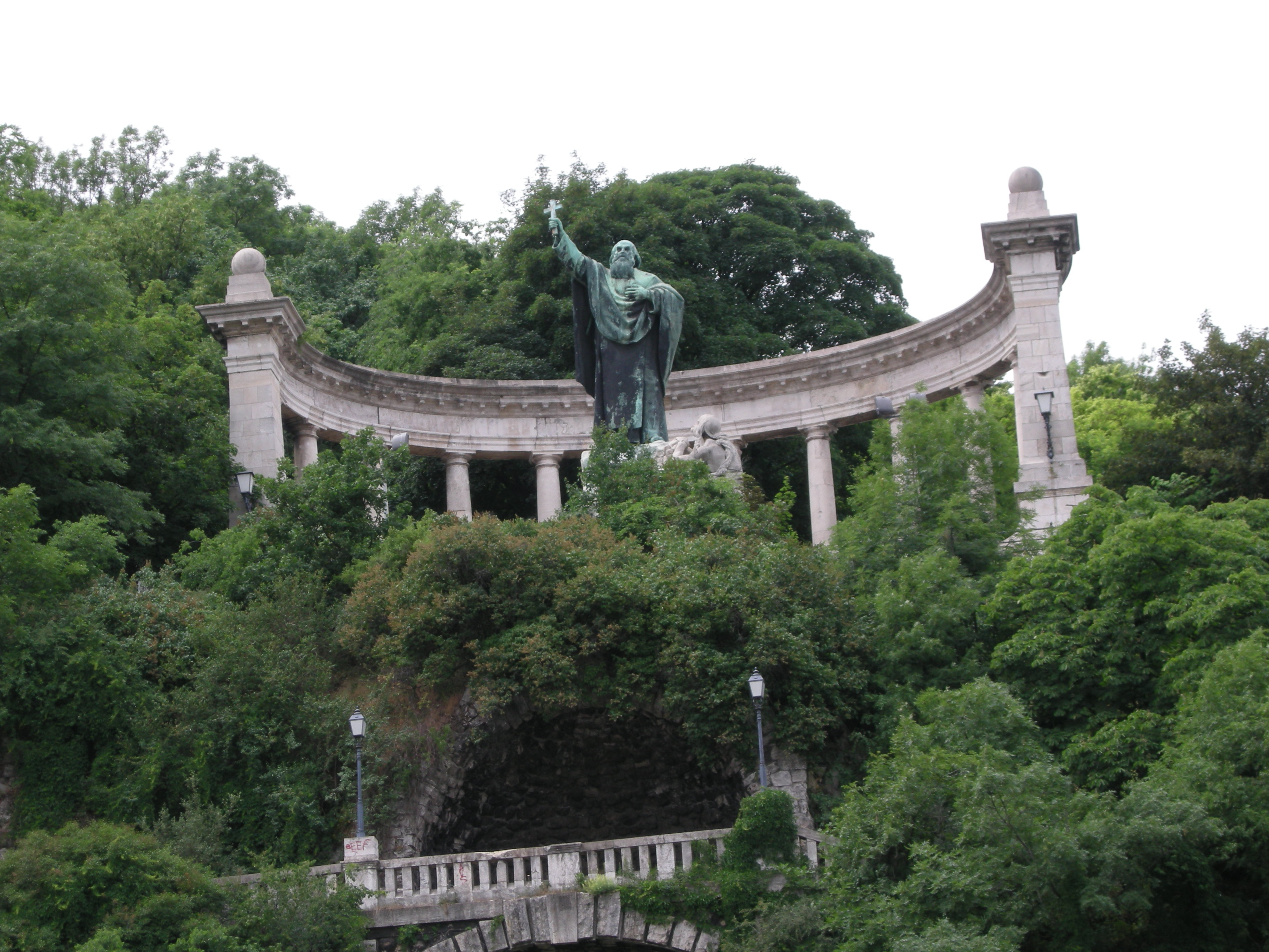 Budapest